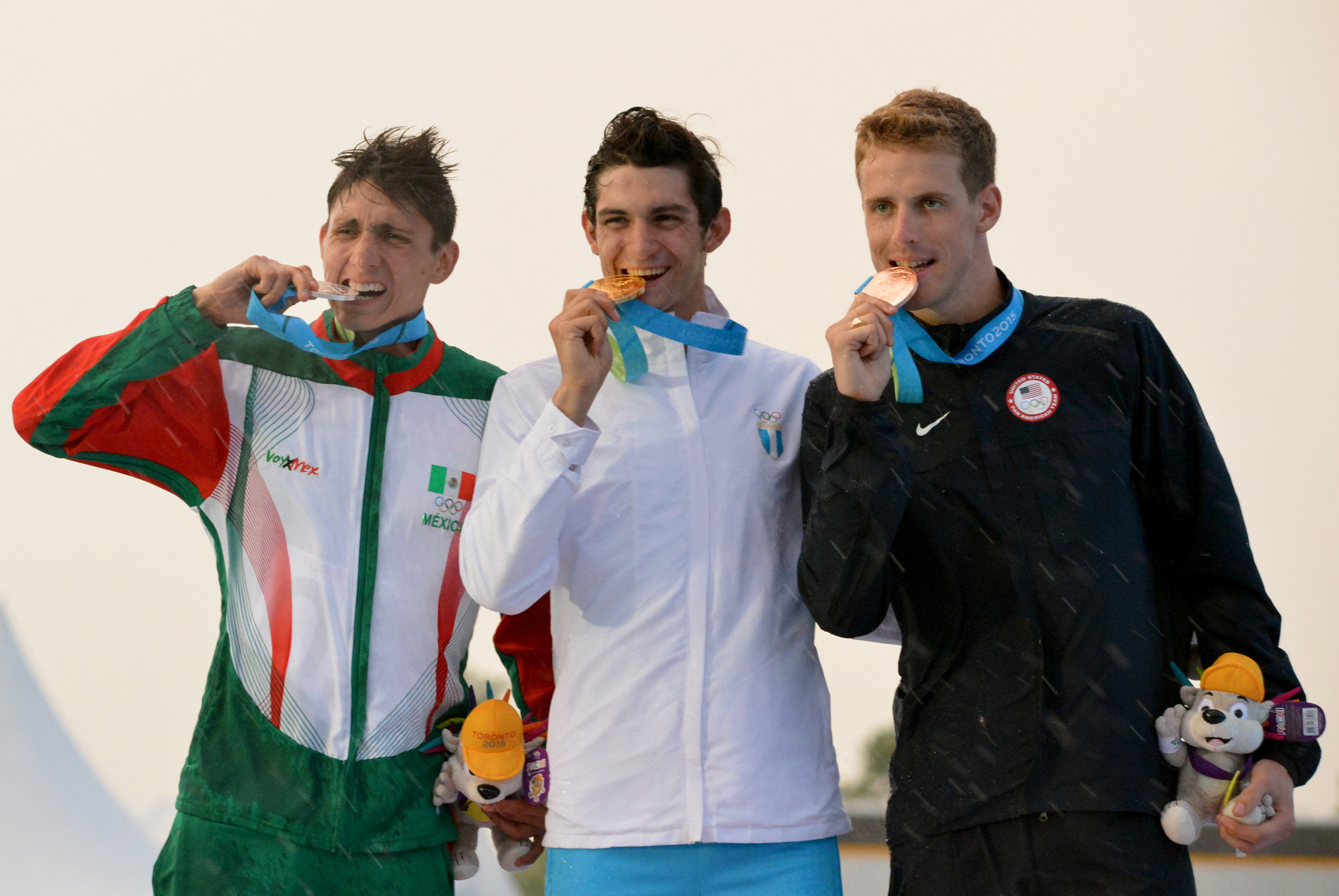 ModPenMedalBite3366